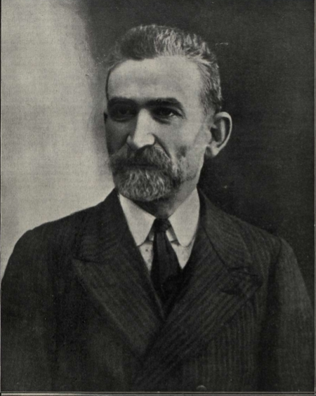 Vicente Barrio, concejal y secretario general de la Unión General de Trabajadores.